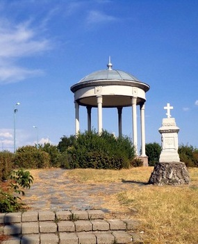 Паметник на Олга Николаевна Скобелева, убита на това място на 6 юли 1880 г. с цел грабеж на пари от руският офицер Алексей Узатис.